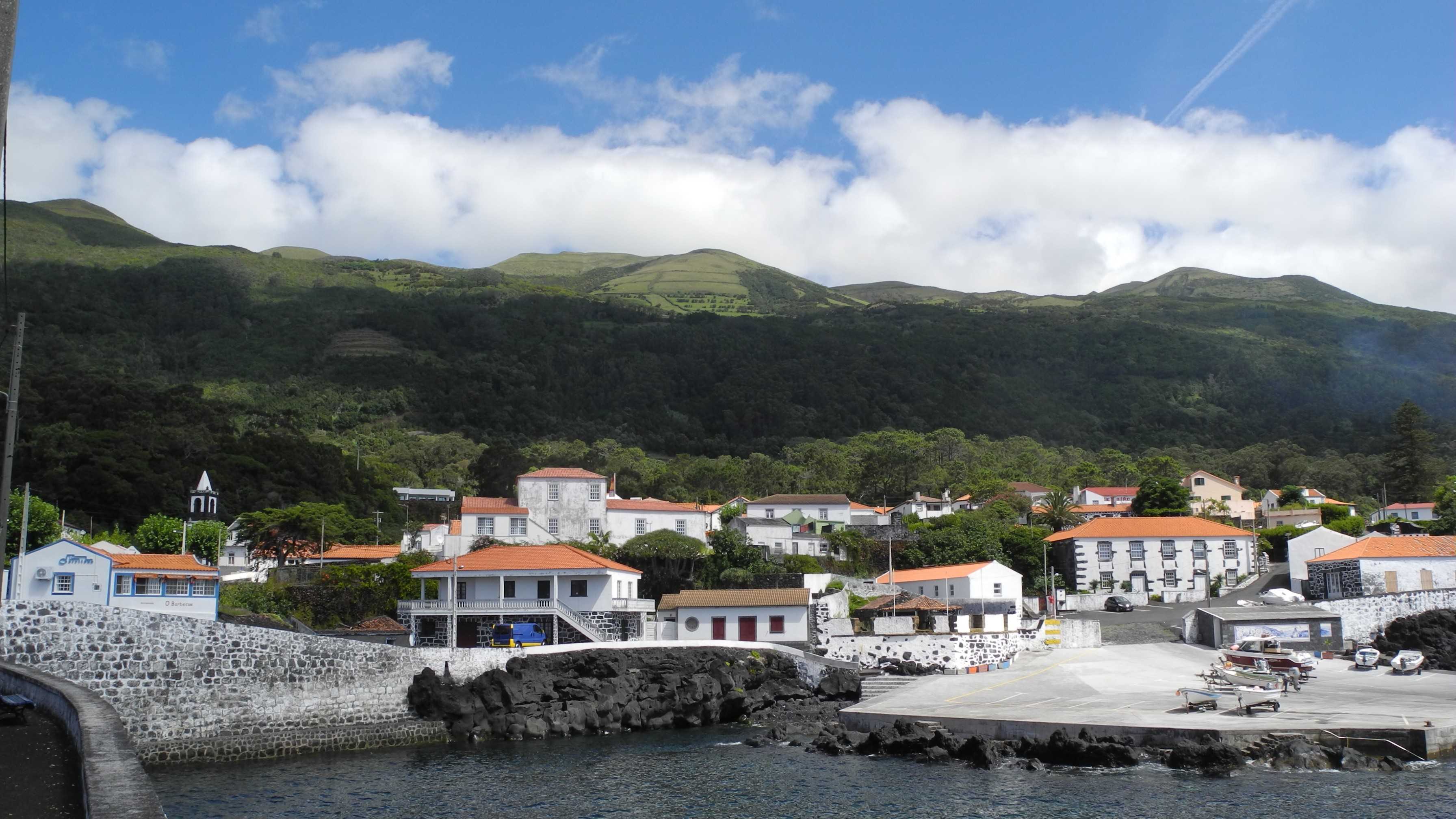 Urzelina - Fischereihafen